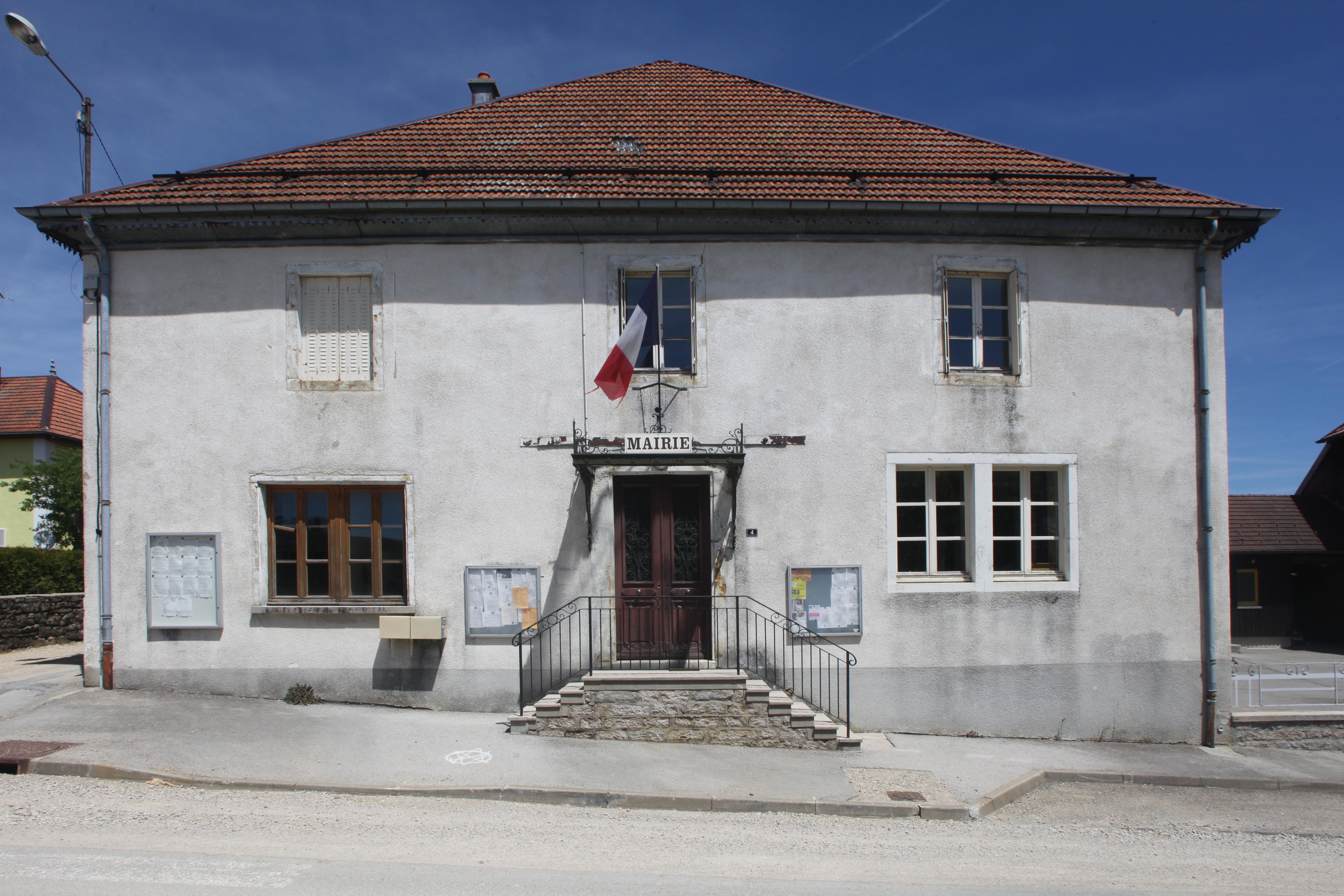 Mairie de Censeau (Jura).